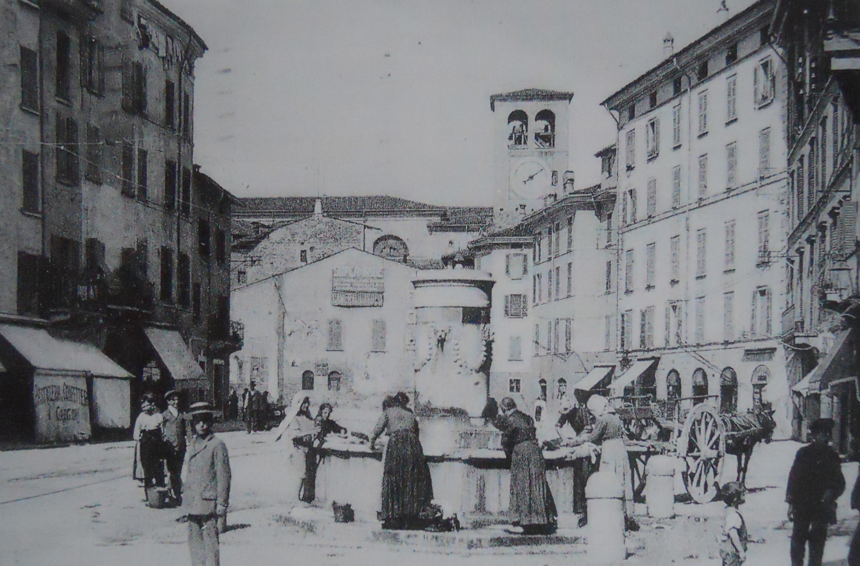 San Faustino maggiore (Brescia), una cartolina degli anni '20